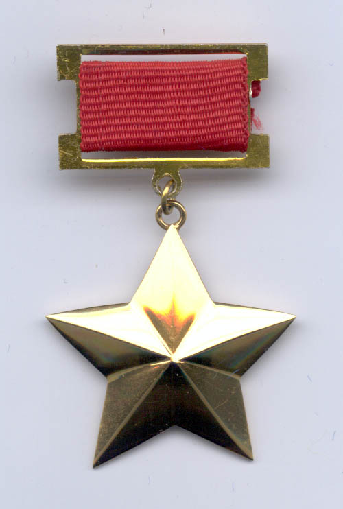 Medalla “Estrella de Oro” se entrega con el titulo honorifico “Héroe popular de Bulgaria”. Desde 1948 hasta 1991 se entregaron un total de 58 medallas a ciudadanos distinguidos de Bulgaria y países del bloque comunista. La medalla “Estrella de Oro” se hacía de oro de 14 quilates en la “Casa de la Moneda” de Sofía.